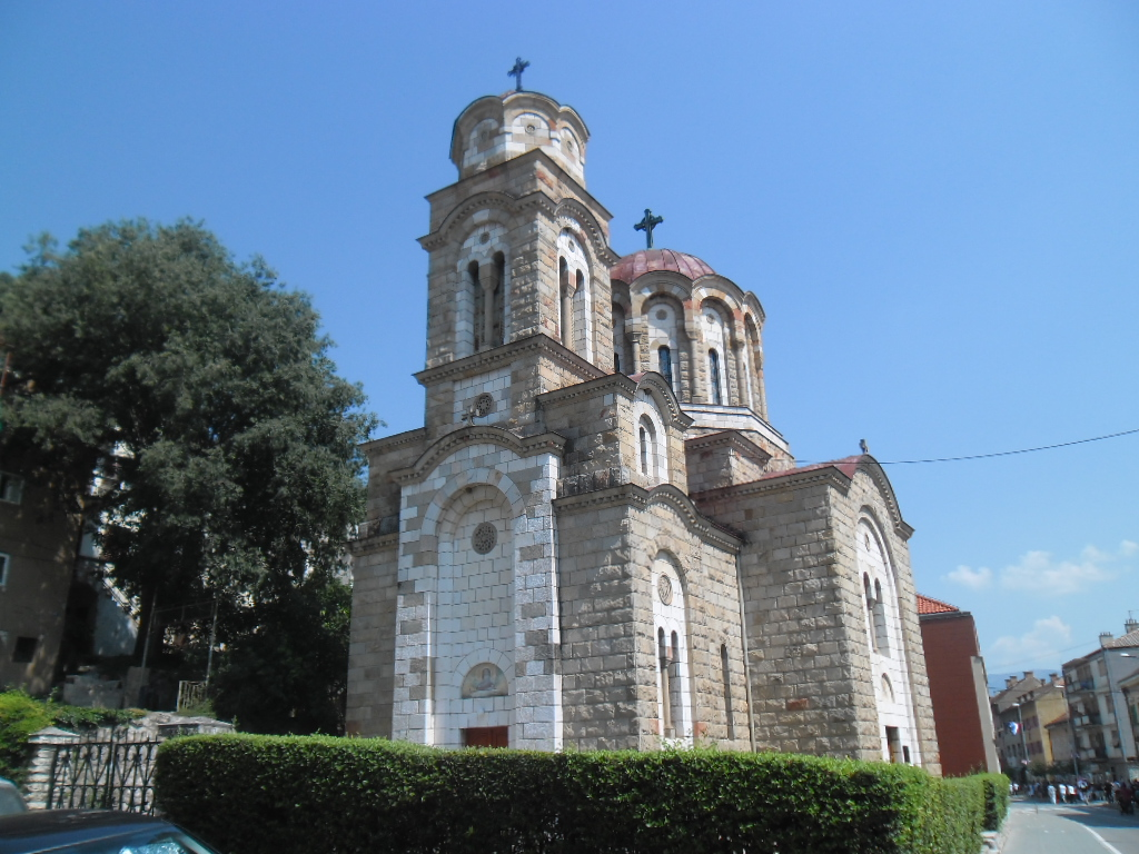 pravoslavna crkva u Kninu